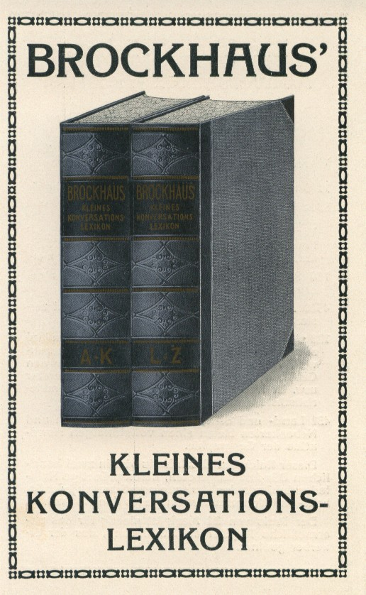 Reclame voor "Brockhaus' Kleines Konversations-Lexikon" (1911). Publiek Domein c.q. eigen opname